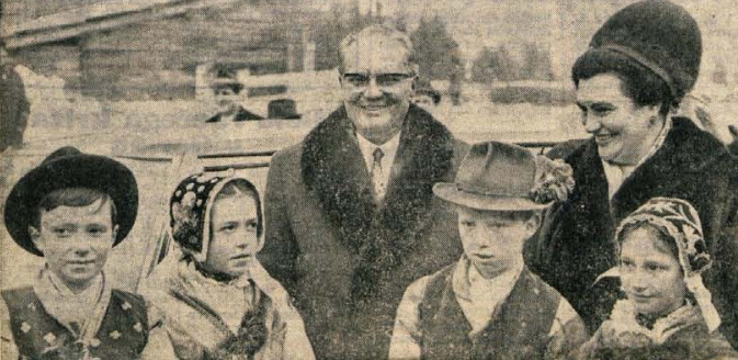 Predsednik Tito v Planici.